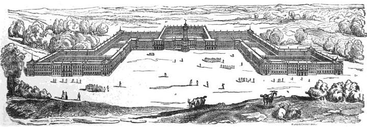 "Idée d'un phalanstère. Habitation d'une phalange de 400 à 500 familles associées ...".